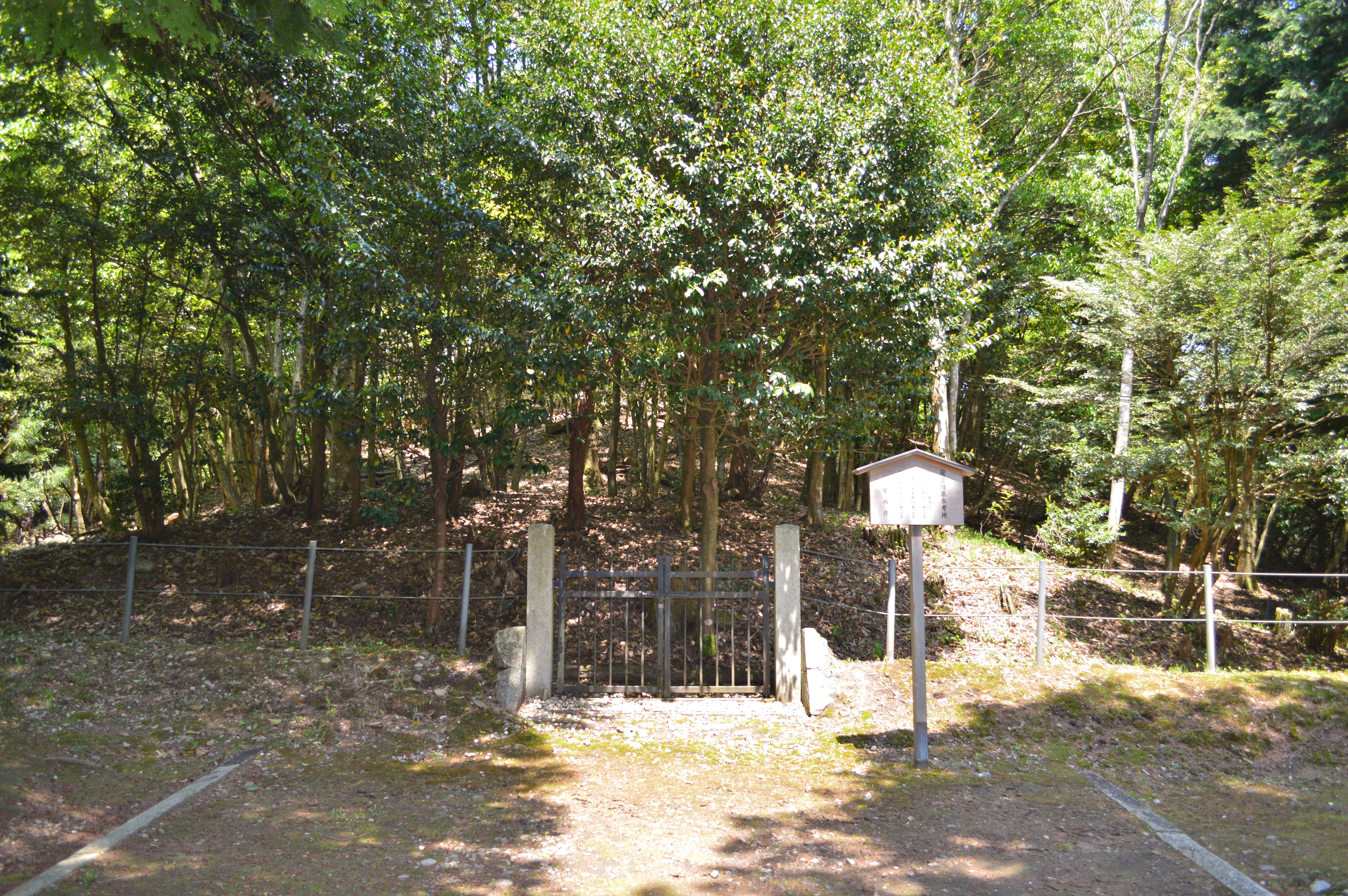 田中王塚古墳 (安曇陵墓参考地)